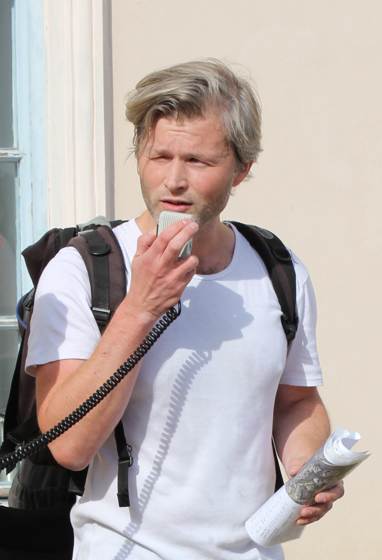 Historik architektury Tomáš Řepa vykládá o usedlosti Rokoska. Personality rights warningAlthough this work is freely licensed or in the public domain, the person(s) shown may have rights that legally restrict certain re-uses unless those depicted consent to such uses. In these cases, a model release or other evidence of consent could protect you from infringement claims.